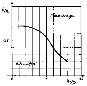 limite de flambage Dessin original de Jean-Jacques MILAN, reproduction libre